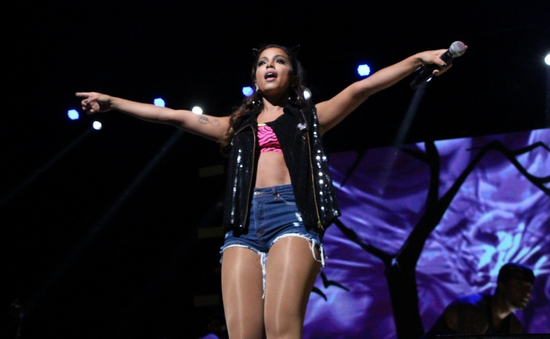 38 - Anitta (38)